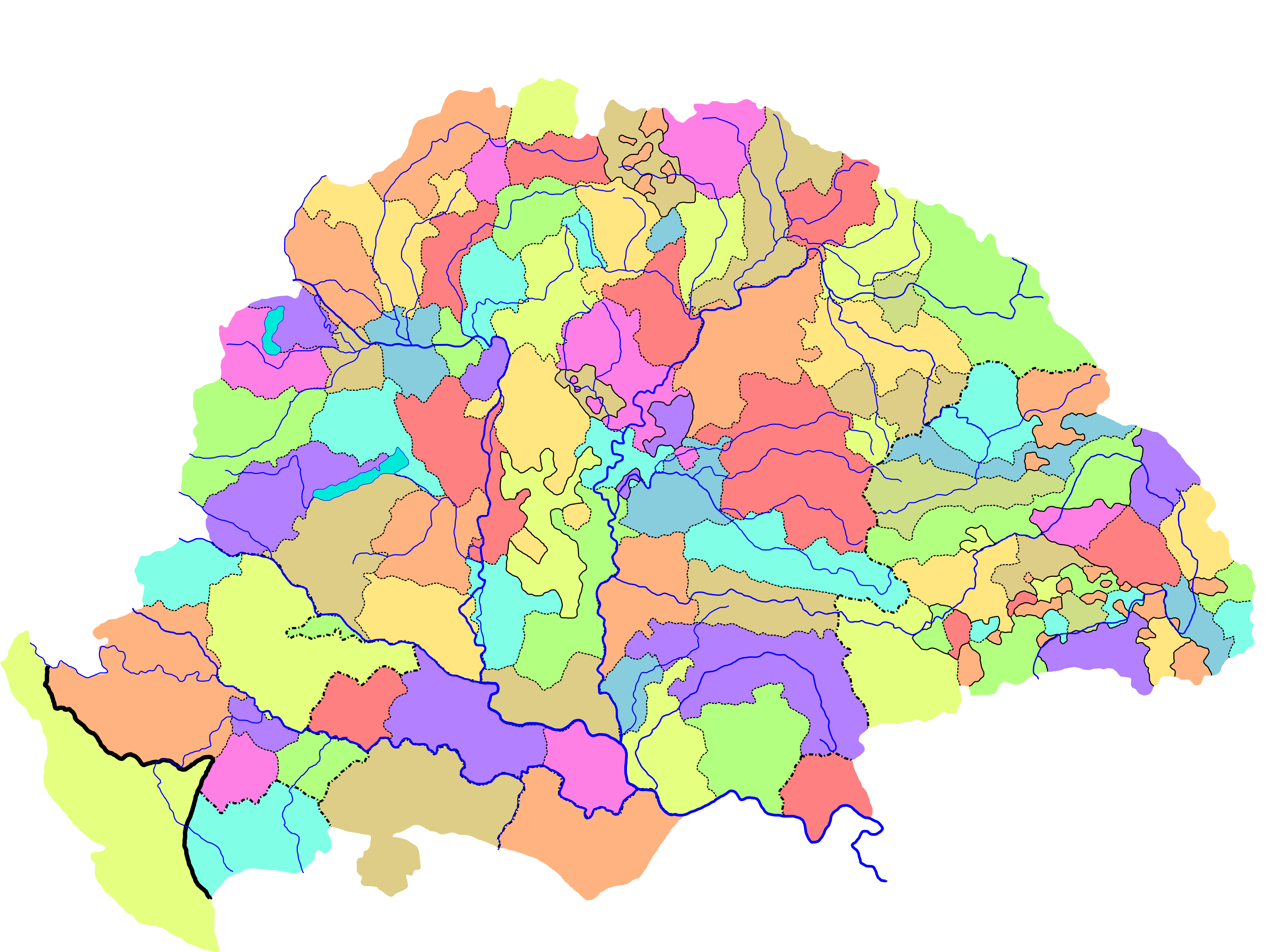 A középkori magyar királyság